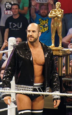 Le catcheur Antonio Cesaro devant le trophée en l'honneur d'André the Giant, créé à son image.